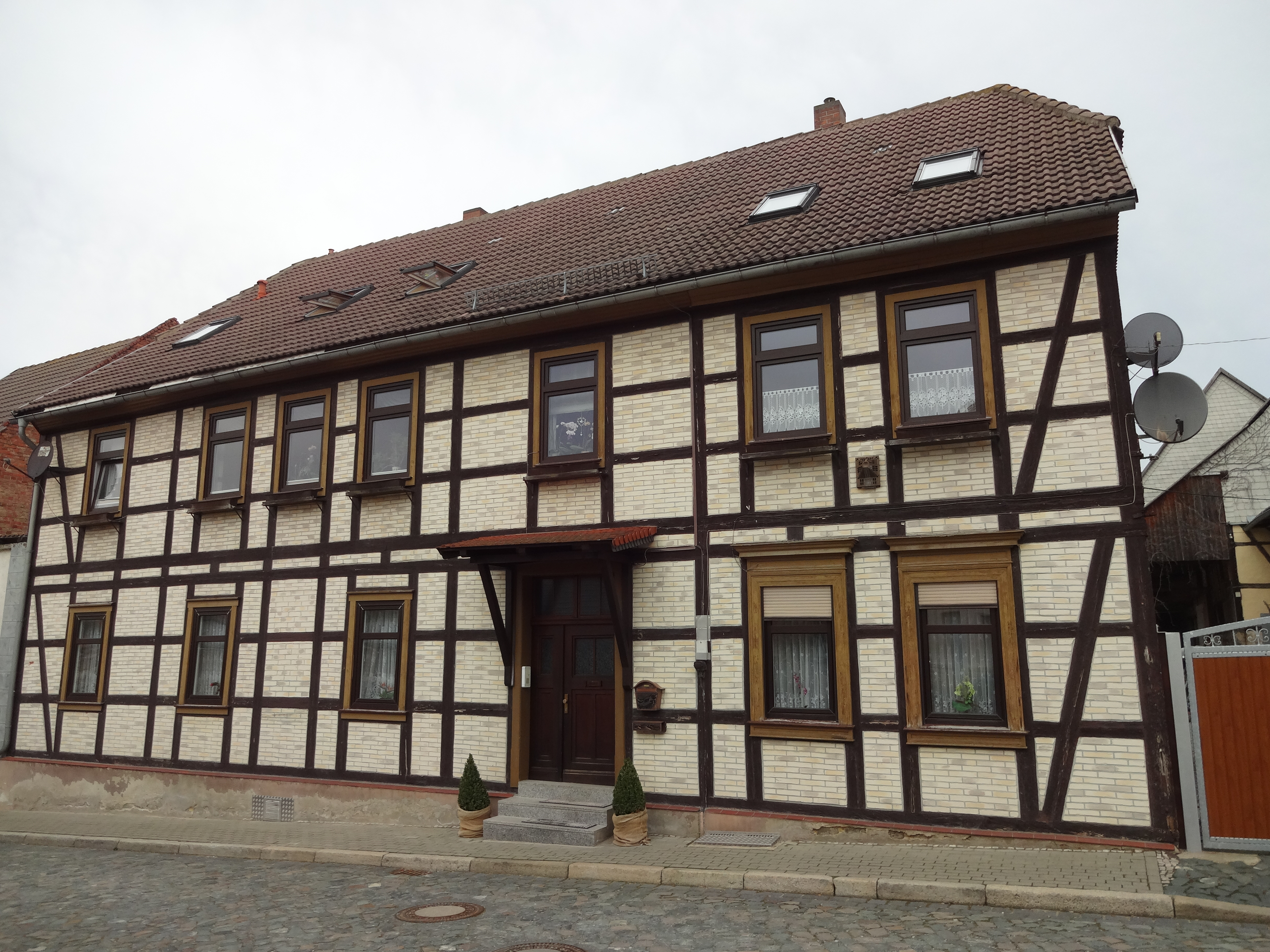 ehemals denkmalgeschütztes Fachwerkhaus in der Mühlenstraße 5 in Derenburg, Ortsteil von Blankenburg (Harz)